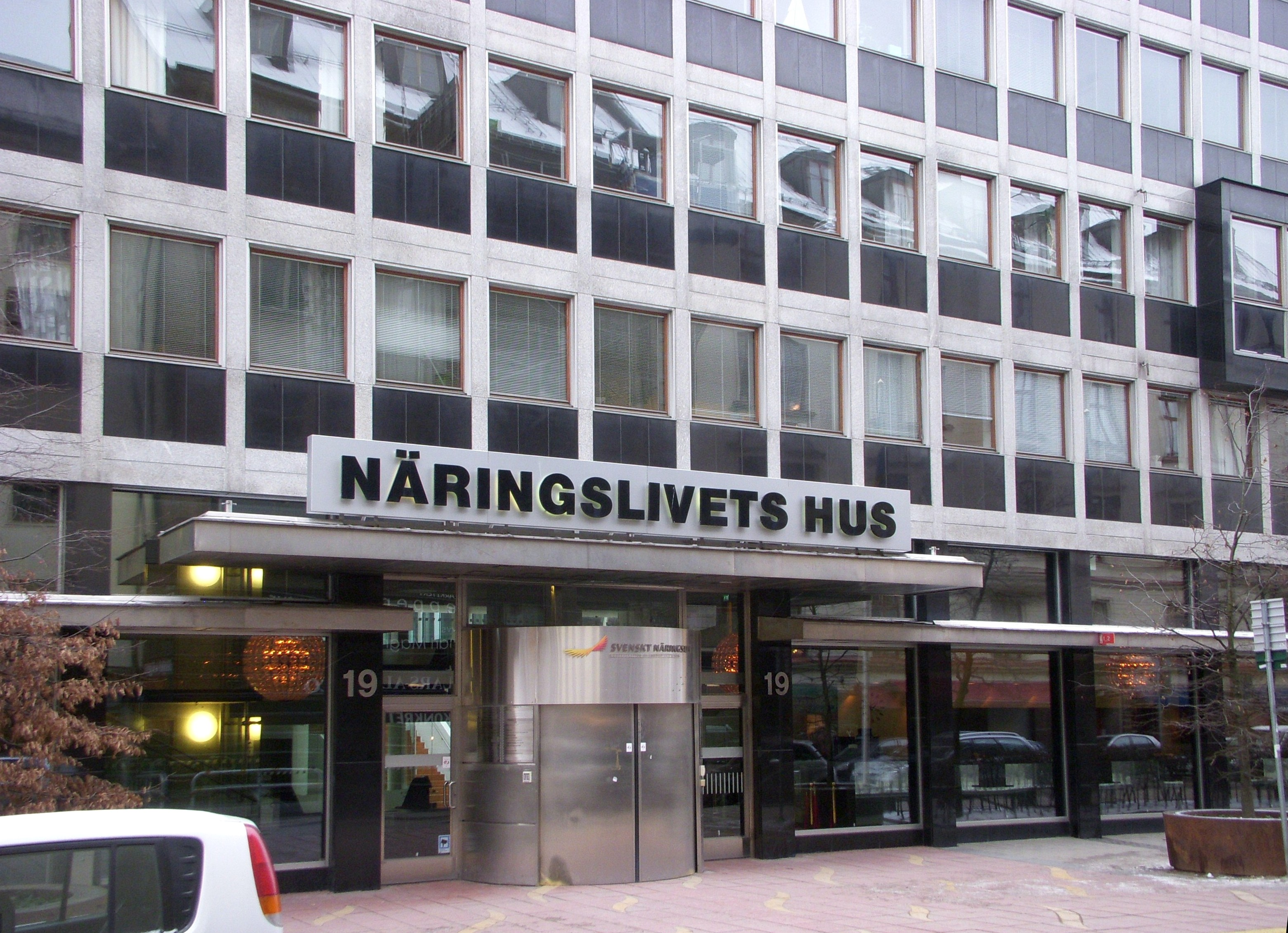 Näringslivets hus, entrén